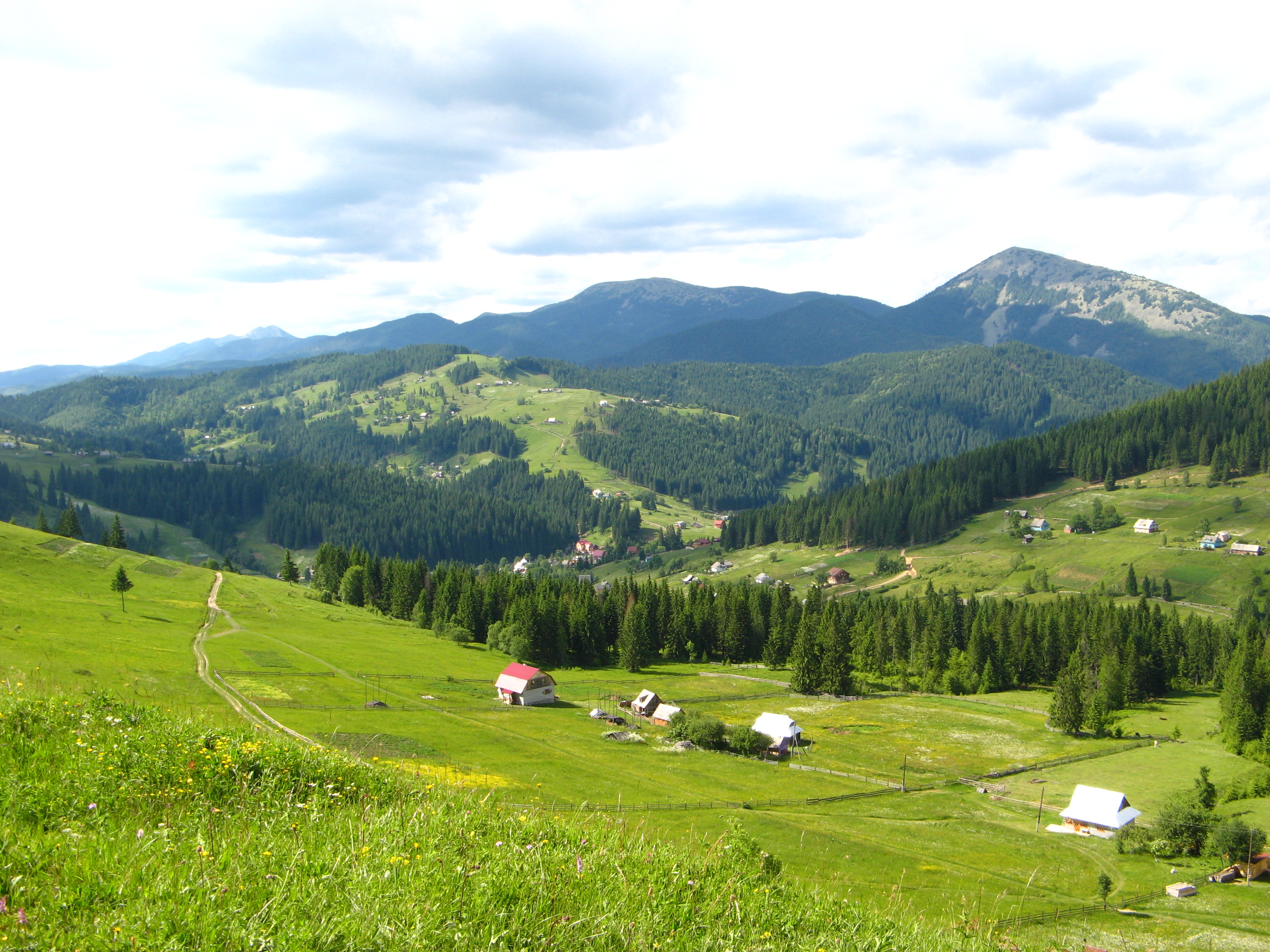 село Яблуниця (Яремчанська міськрада, Івано-Франківська обл.)